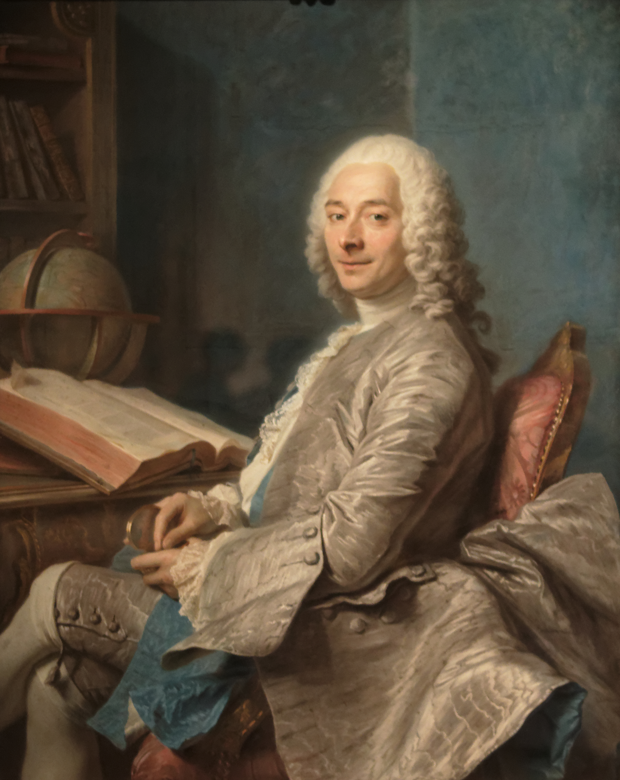 Louis Duval de l'Epinoy, marquis de Saint-Vrain (1696-1778)